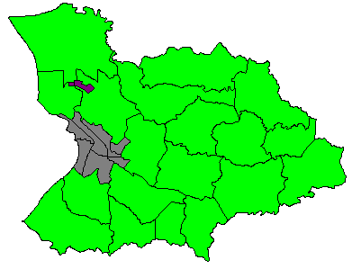 Comunidad Alturas, ubicada en los Barrios Sabanetas y Algarrobos de Mayagüez.